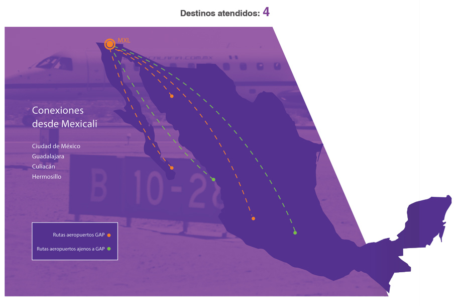 Destinos de Mexicali